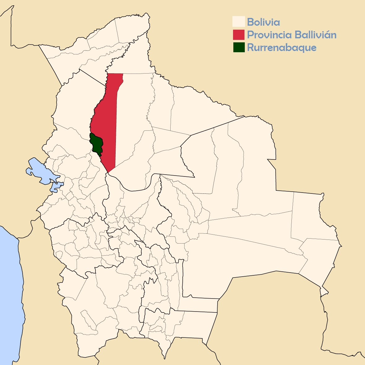 Rurrenabaque en mapa